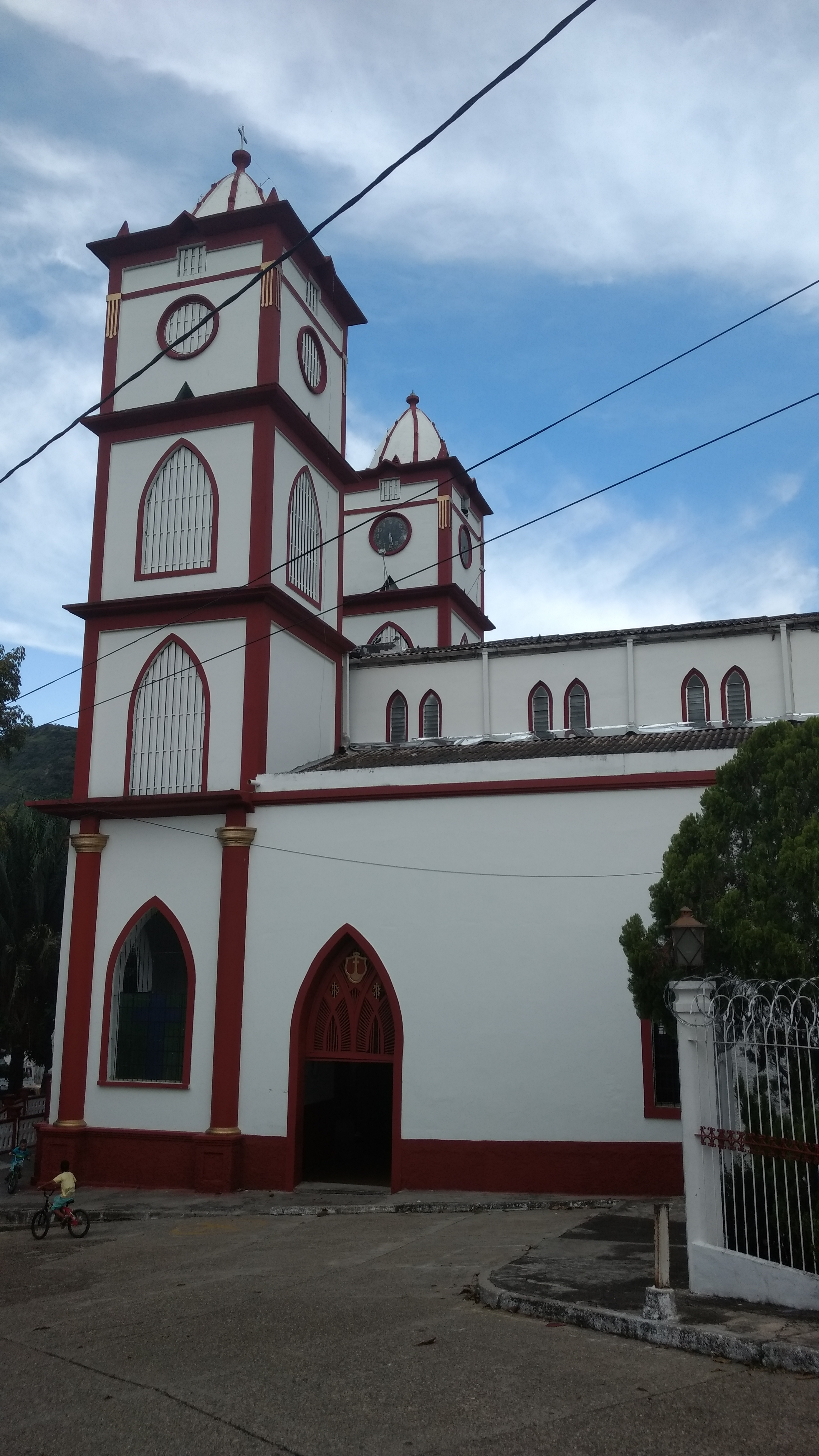 Fotos del 23° Congreso Colombiano de Esperanto, que tuvo lugar en el pueblo de Honda, Tolima, Colombia.